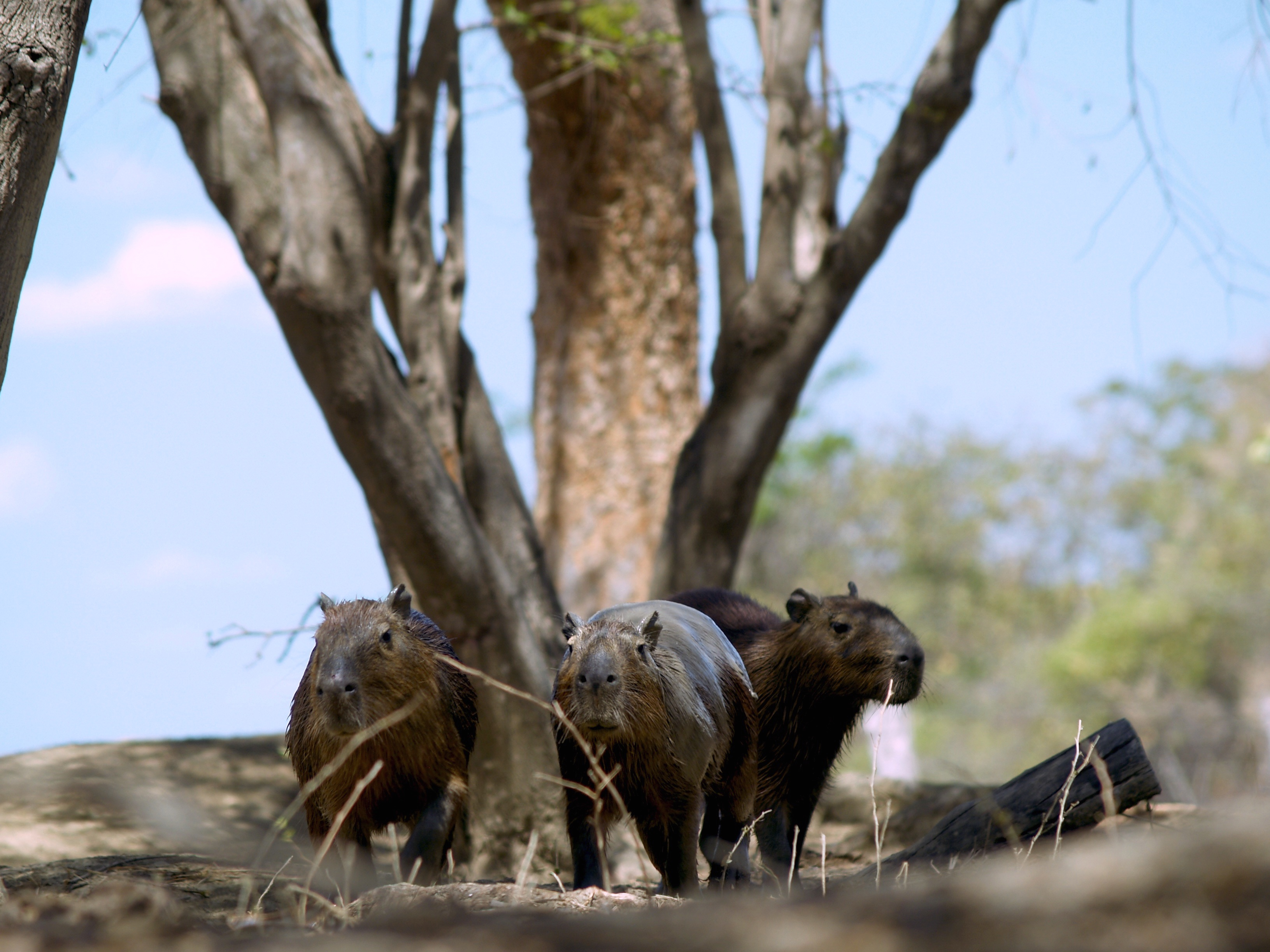 Grupo de Chigüires caminan junto a un tranquilo río en el Hato Piñero, Edo. Cojedes. Venezuela